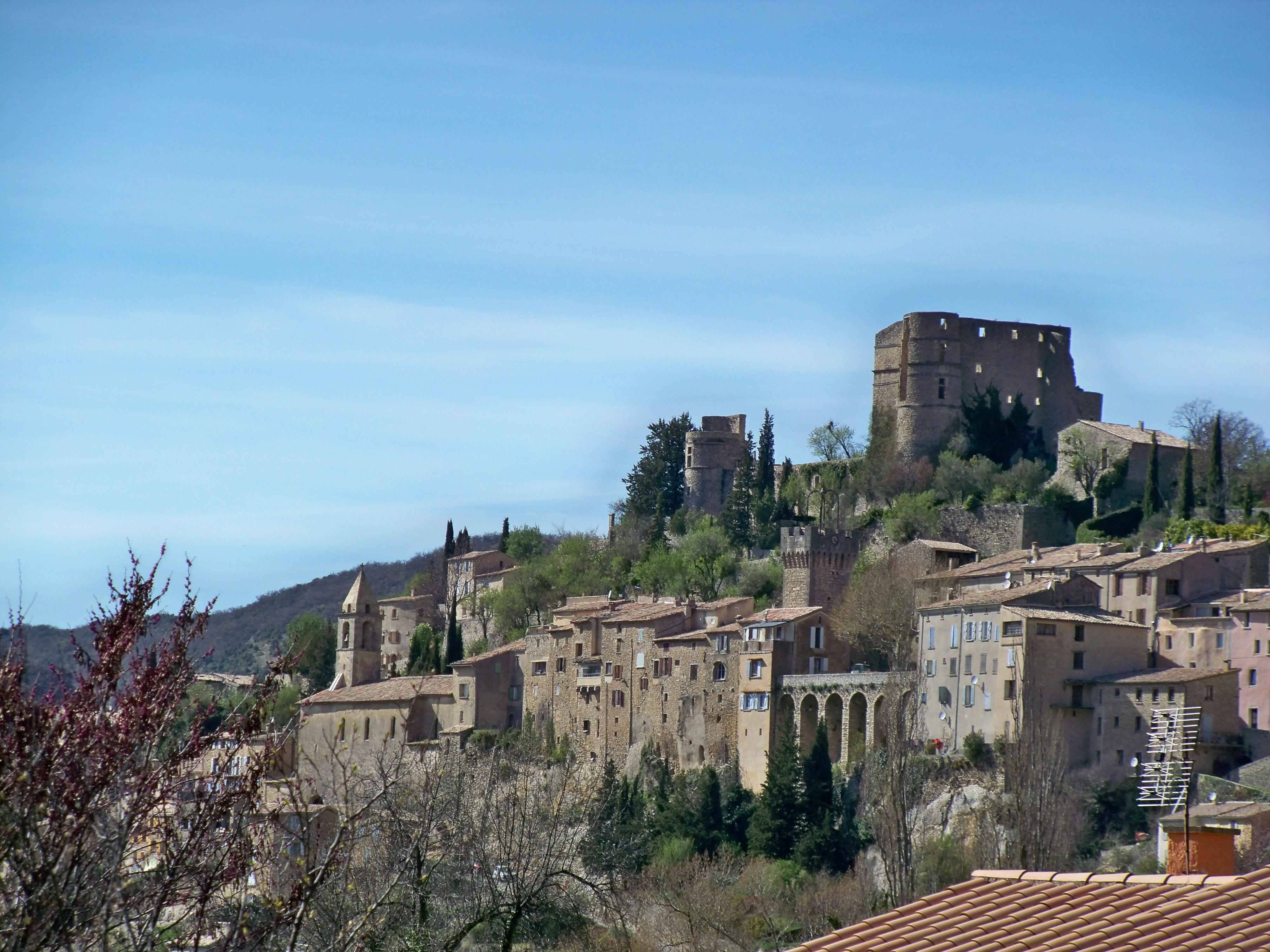 village de Montbrun les Bains (26)